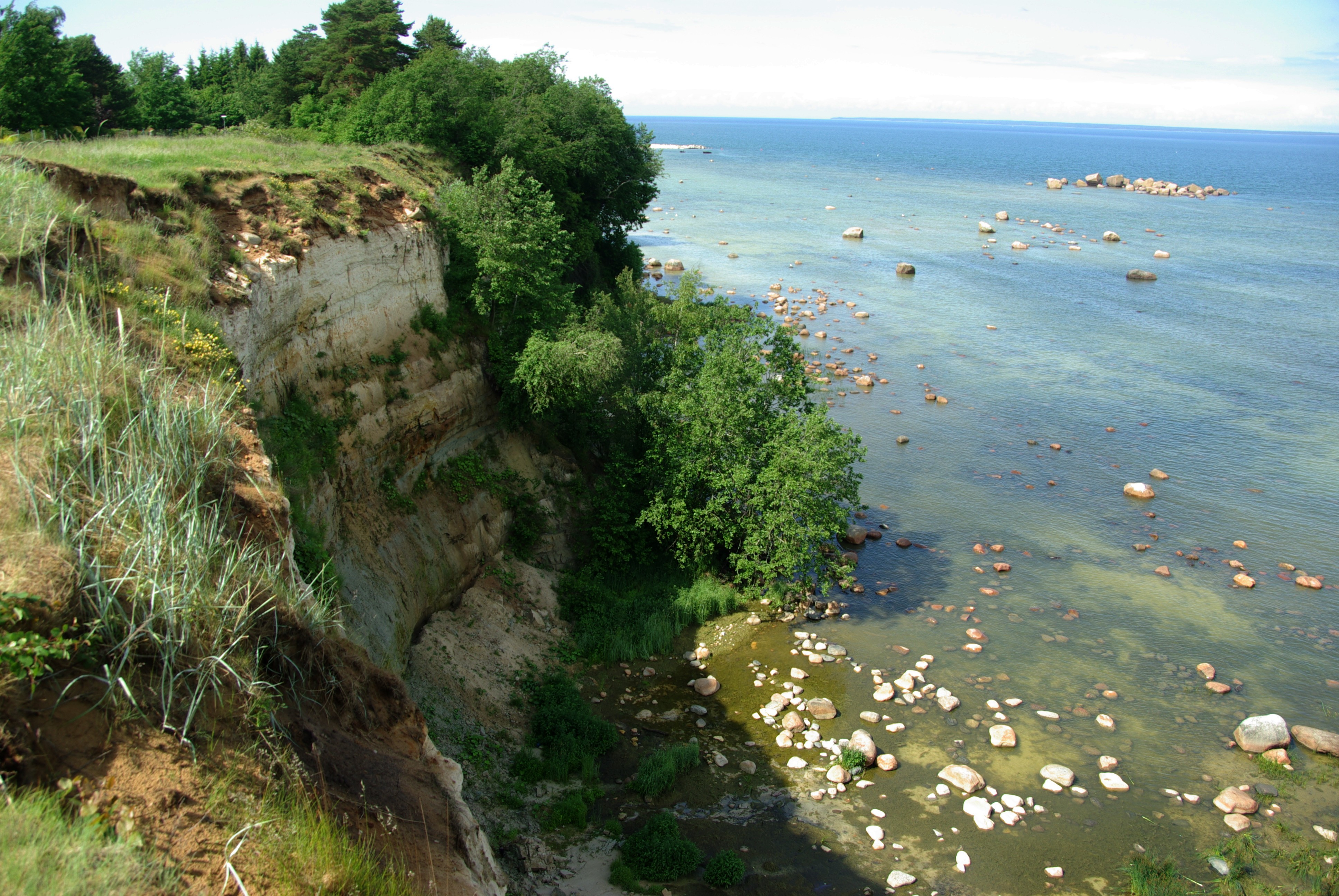 Tilgu sadama juures Harjumaal Rannamõisa maastikukaise alal